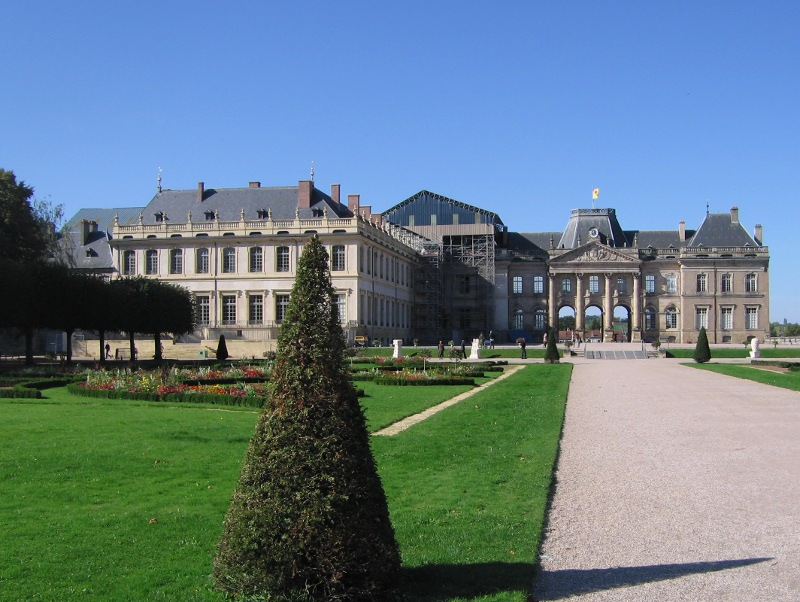 Vue du château de Lunéville depuis le Parc des Bosquets, octobre 2010. Licence CC-BY-SA et GFDL